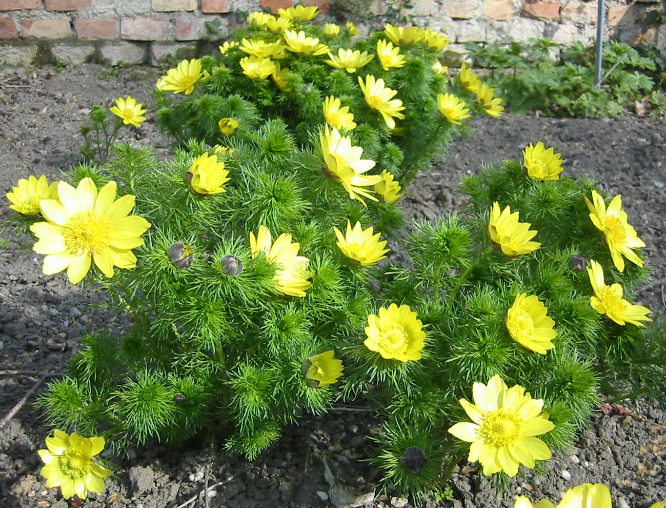 Adonis vernalis; Botanical Garden, Vienna, Austria